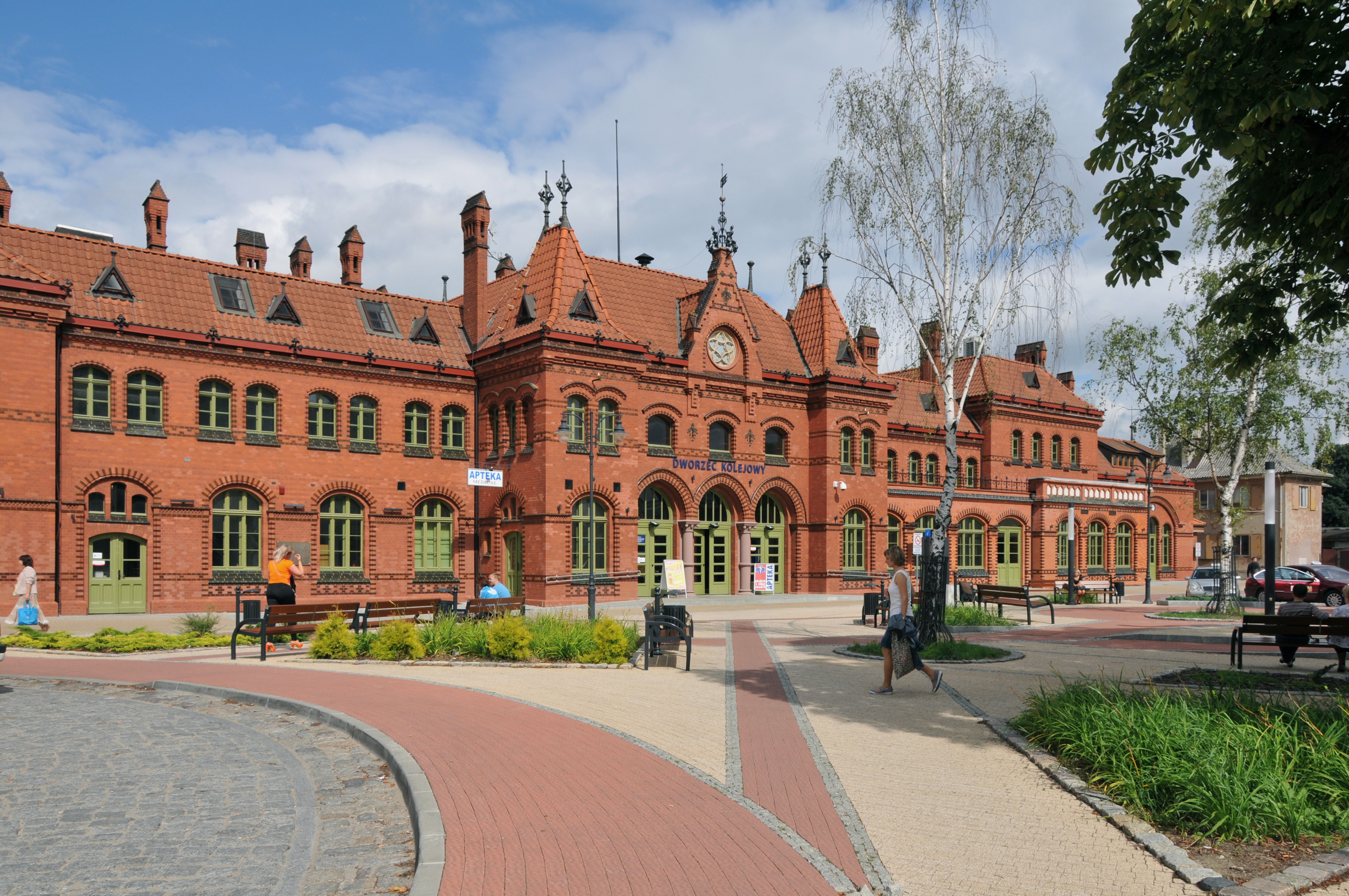 ESTACION DE MALBORK